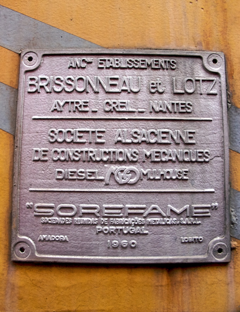 pormenor da placa dos fabricantes. Local: Estação do Poceirão [Linha do Alentejo, PK 30] Data e hora: 31 de Agosto de 2008 [11h11] Material: Locomotiva 1208 [Brissonneau & Lotz • Sorefame] N.º UIC: 93 94 200 0033-2 P (Ferrovias MVLM 10)